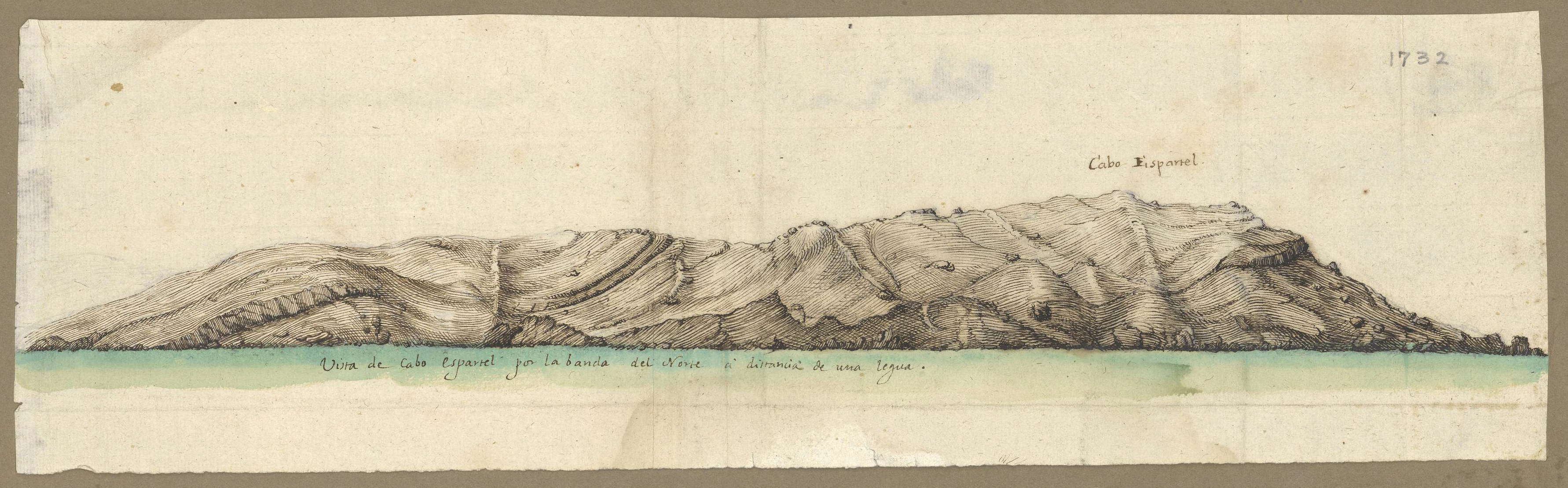 Dibujo del cabo Espartel (Marruecos) en 1732. Aparece en el mismo documento que File:Vista del Castillo de Almazarquivir por la banda de Oran (1732).jpg